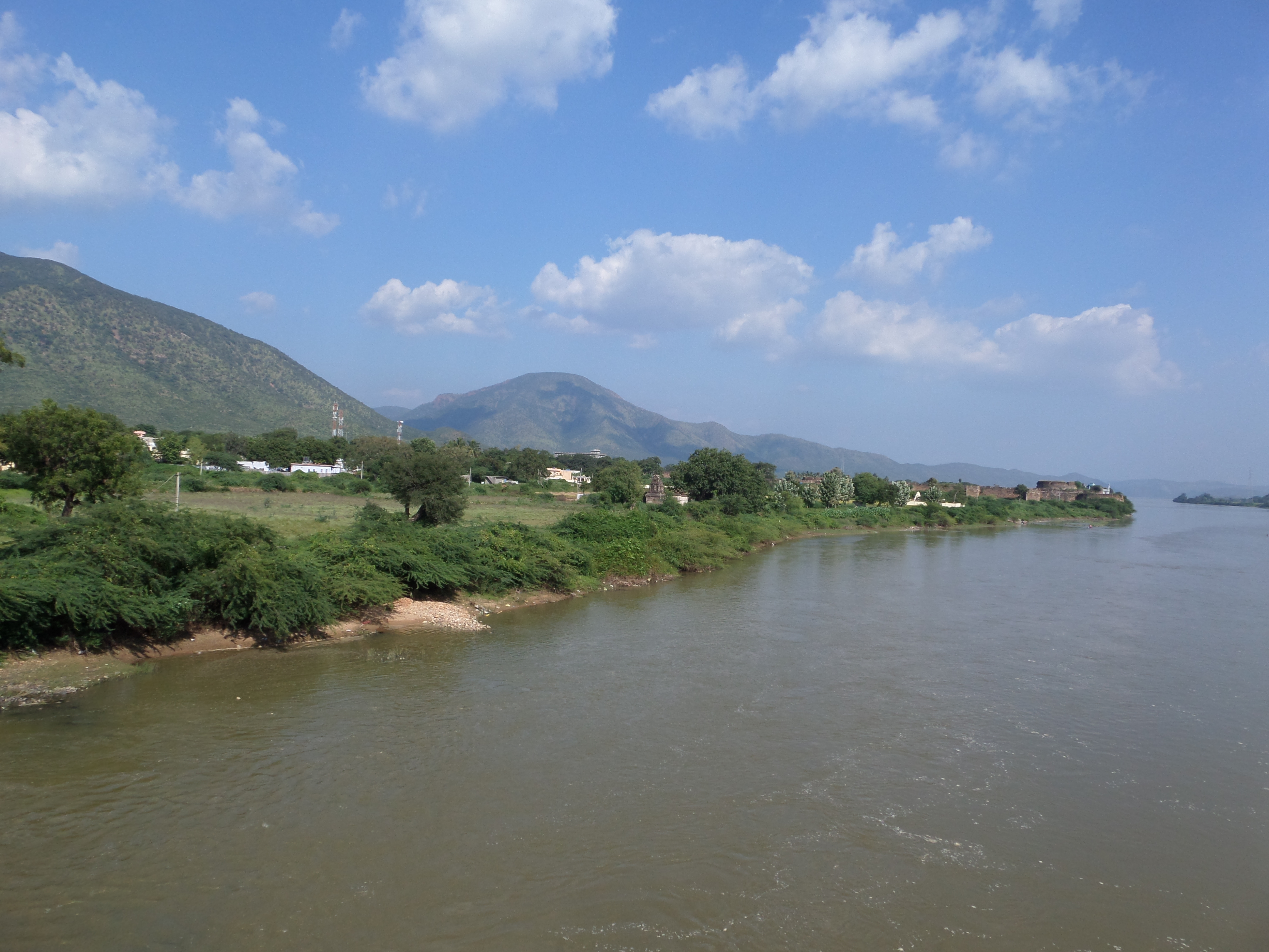 siddhivattam town,penna river,kadapa,A.P